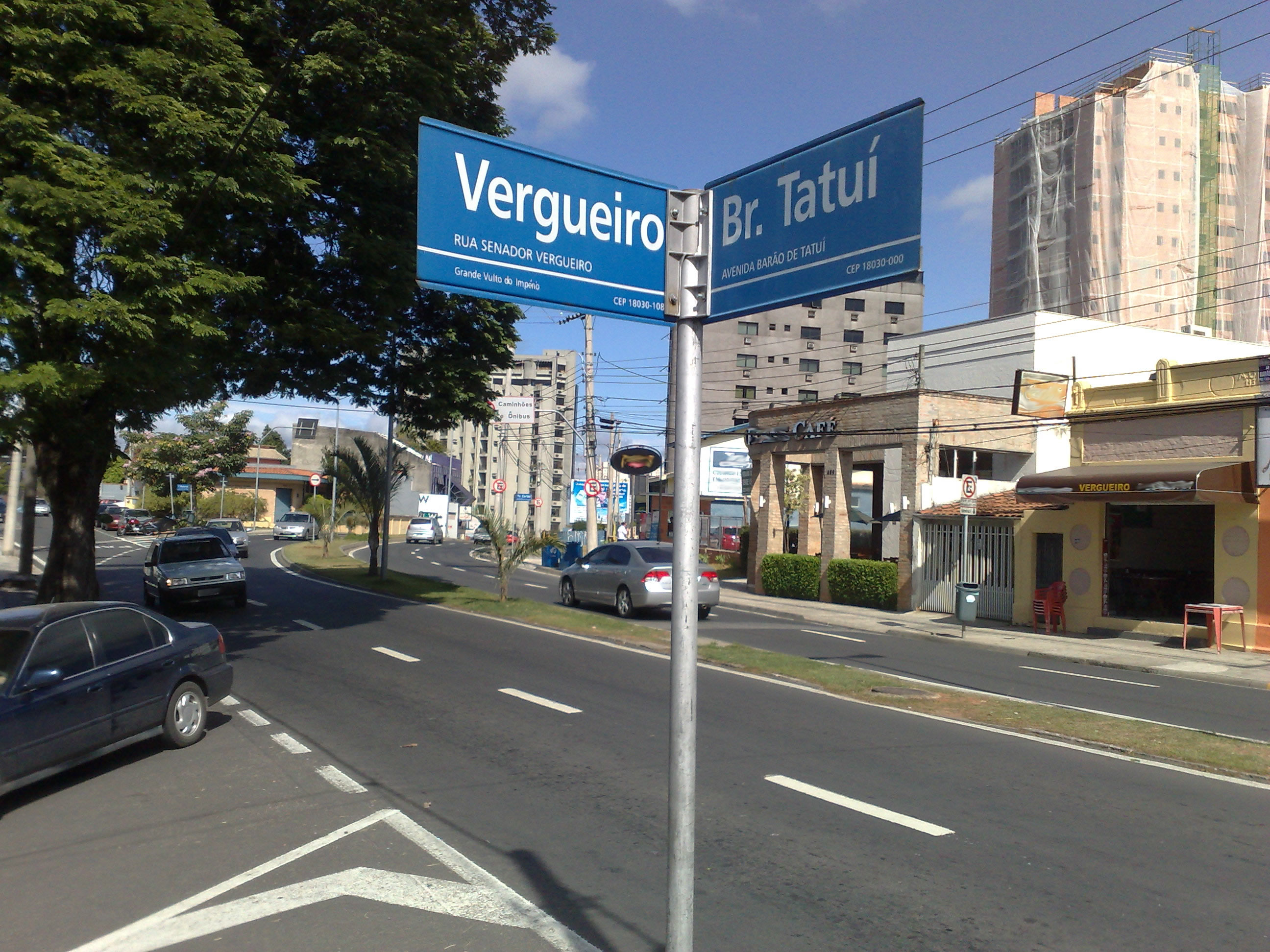 Rua Senador Vergueiro esquina com Av. Barão de Tatuí - Bairro Vergueiro - Sorocaba, SP